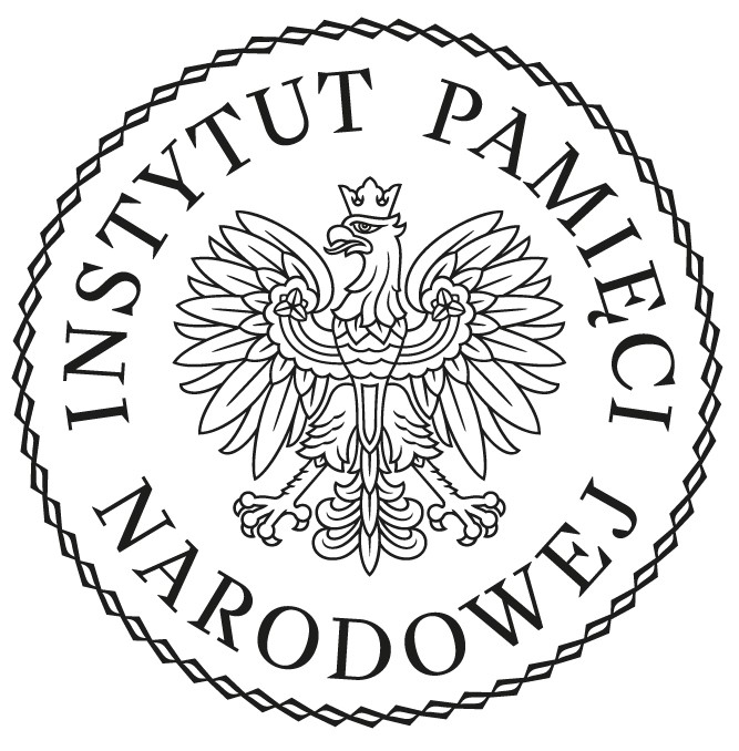 Logo Instytutu Pamięci Narodowej